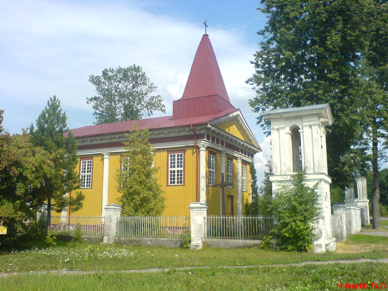 Raguvėlės bažnyčia